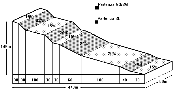 Prospetto pista sci d'erba